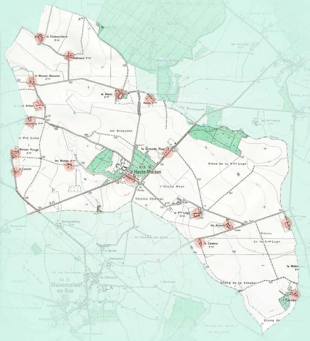 Carte de la Ville de LA HAUTE MAISON